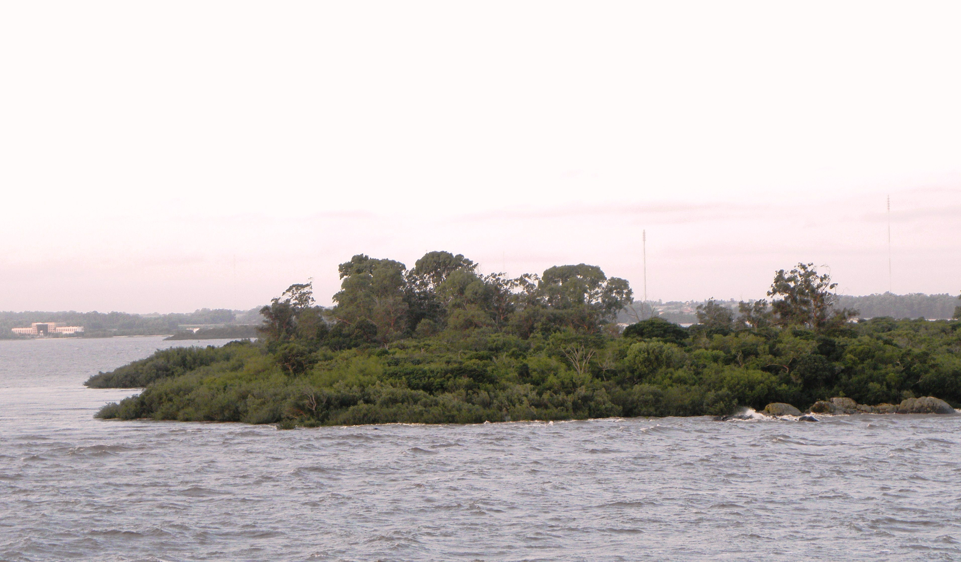 Isla San Gabriel, en las aguas del Río de la Plata, frente a la ciudad de Colonia del Sacramento, República Oriental del Uruguay.